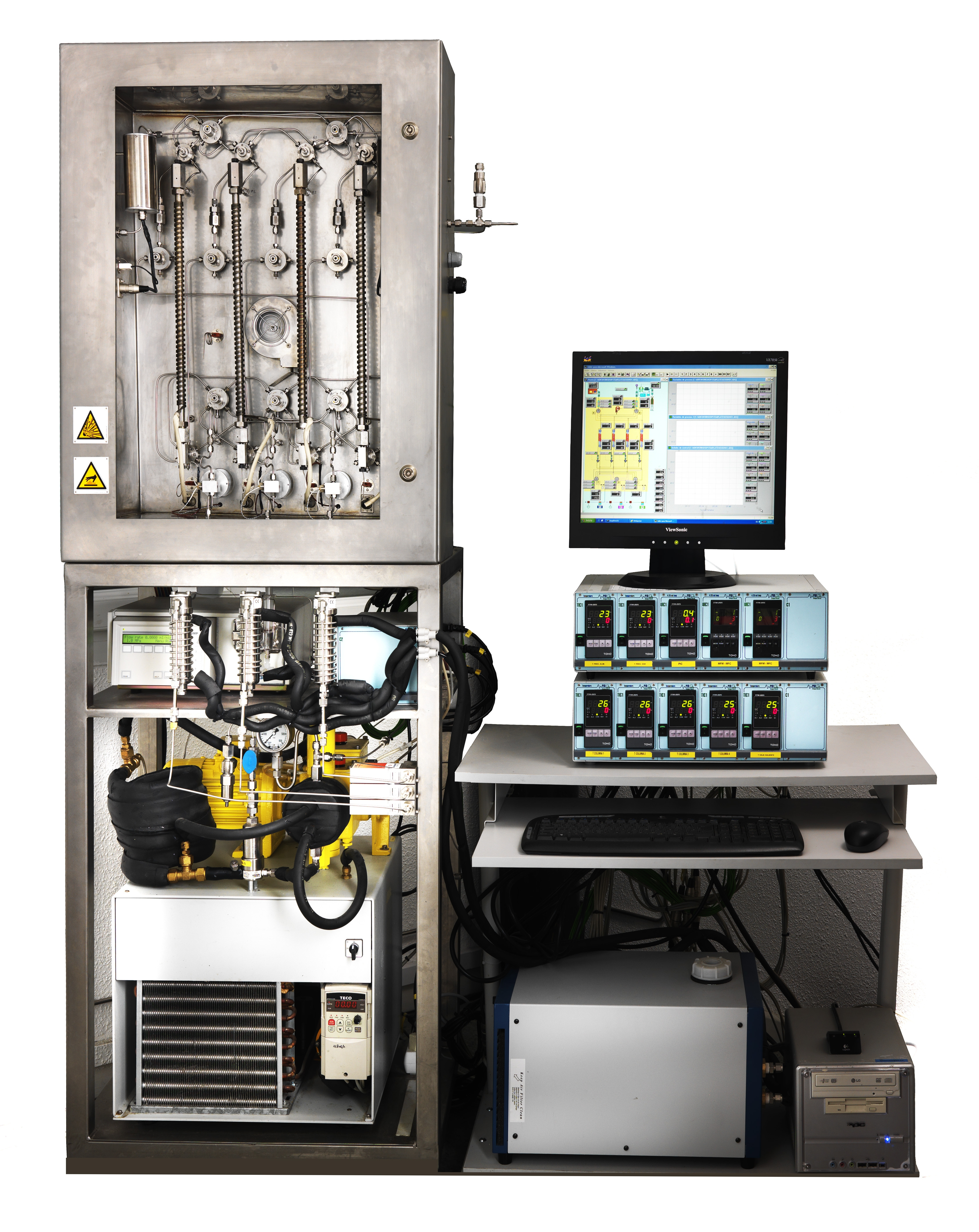 Ejemplo de fraude al Instituto Madrileño del desarrollo. Planta construida con su subvención y a continuación vendida al Instituto de Fermentaciones Industriales